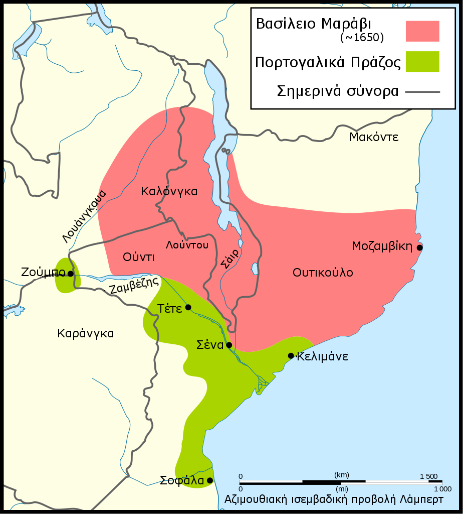 Χάρτης του βασιλείου Μαράβι το 1650 μ.Χ.